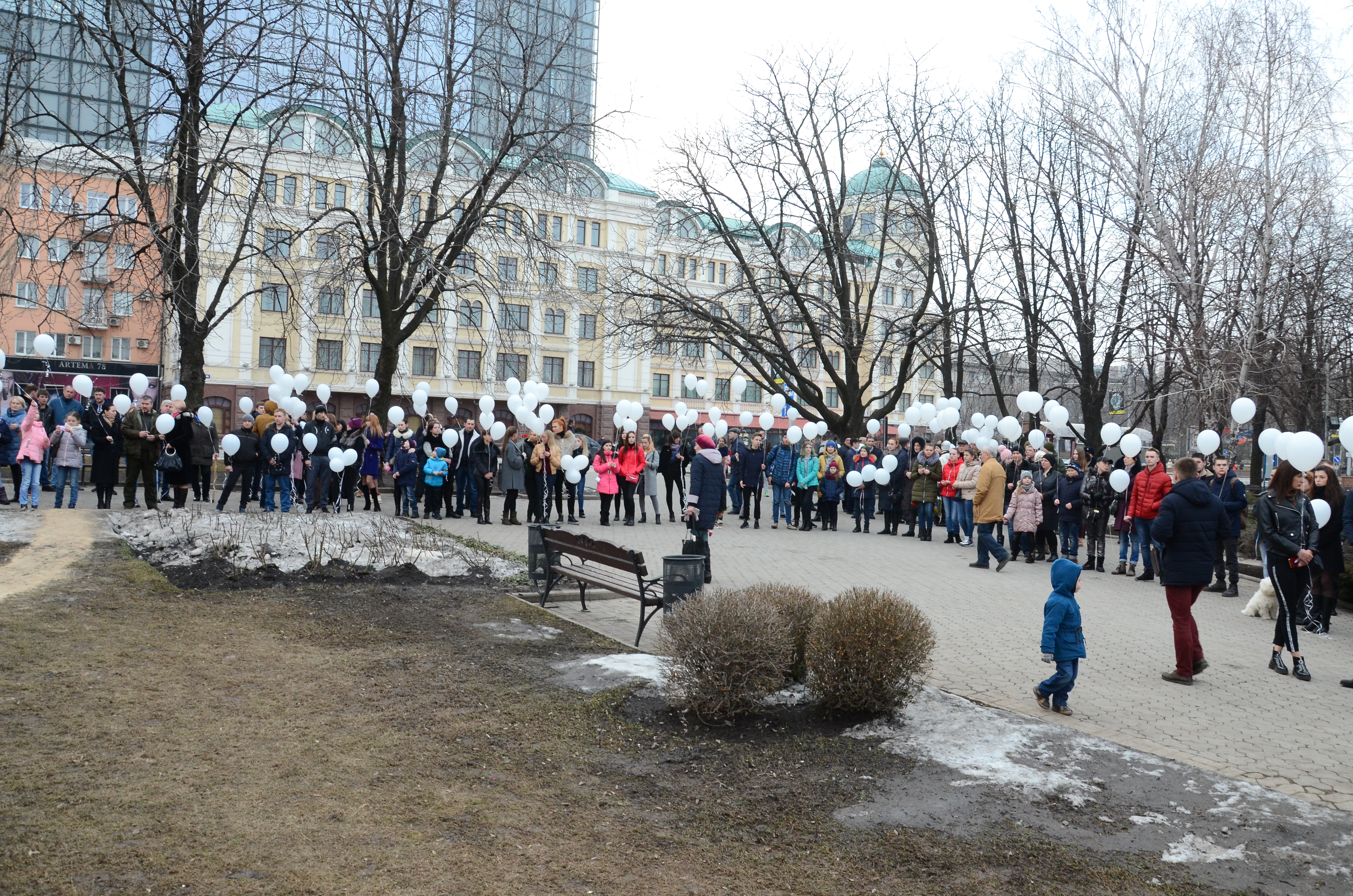 Мероприятие в Донецке память о погибших в Кемерово